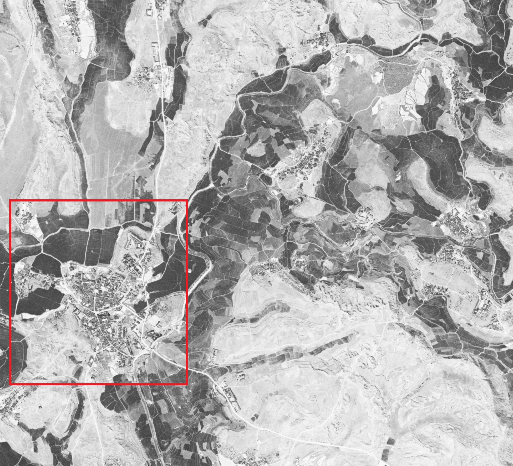 1970年代石林县城卫星影像，红框内为石林县城（上传者标记），由美国间谍卫星拍摄，USGS中的编号：DS1109-2200DF027